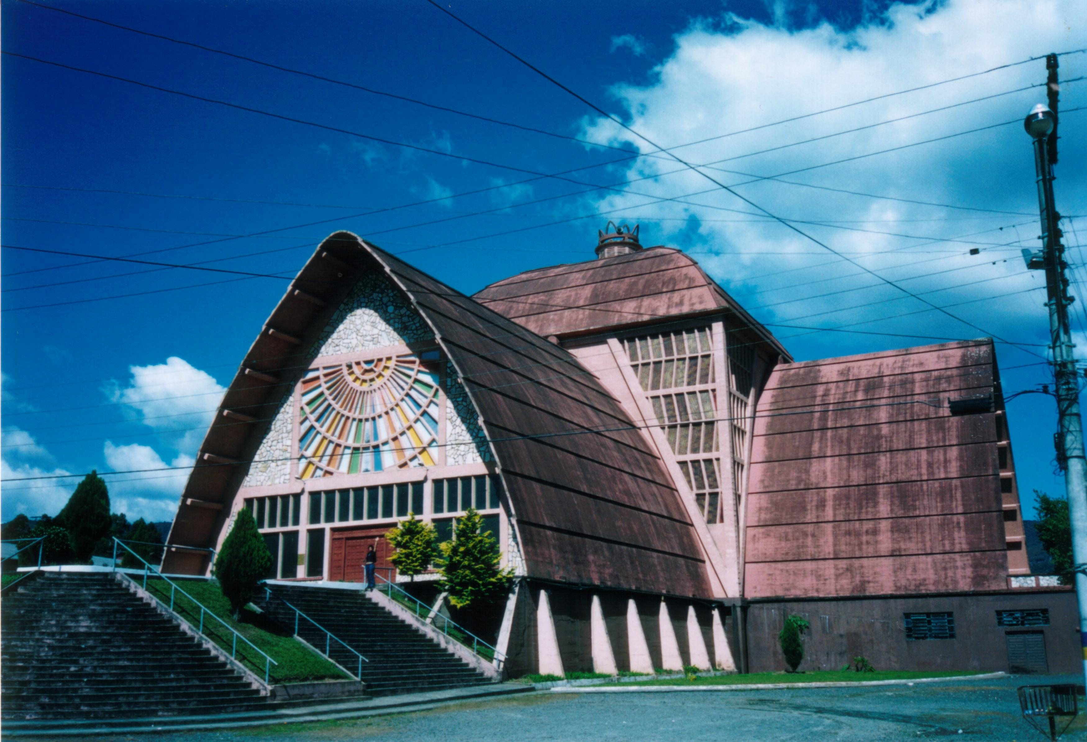 Vue de l'extérieur de l'église paroissiale d'Urubici